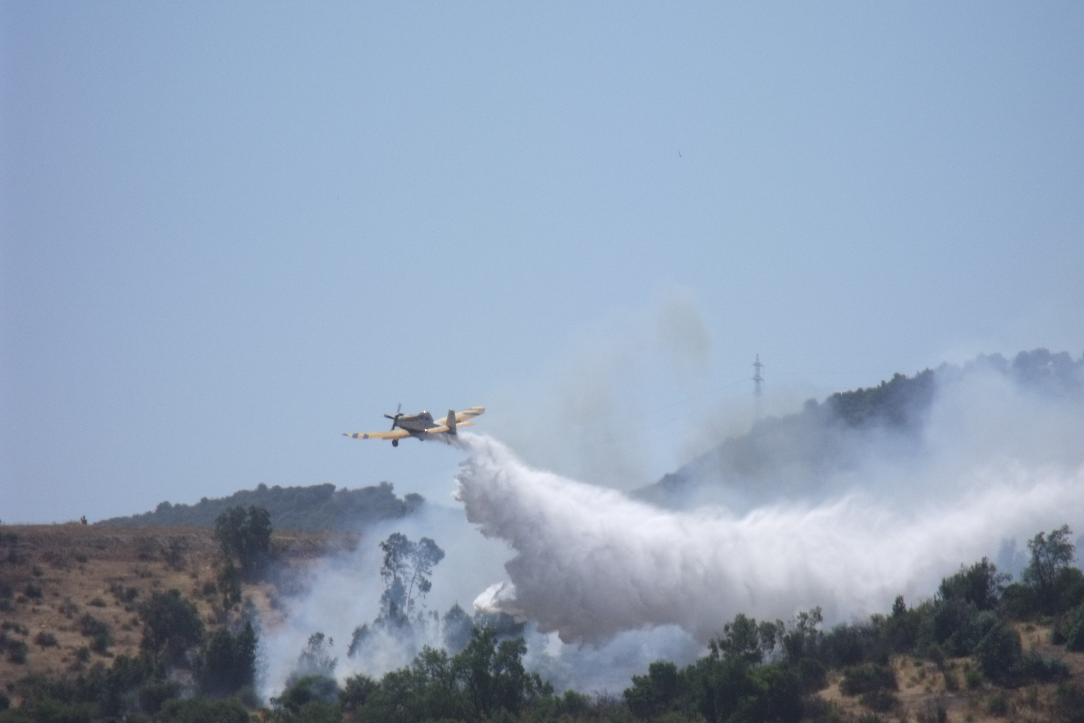 Avión PZL-Mielec M18 "Dromader" extinguiendo un incendio forestal en Belloto Norte, Quilpue, Región de Valparaiso, Chile